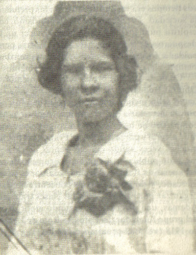 María de los Angeles Tapia, mejor conocida como María Barilla